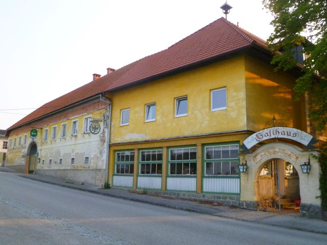 Gut Waikhartsberg